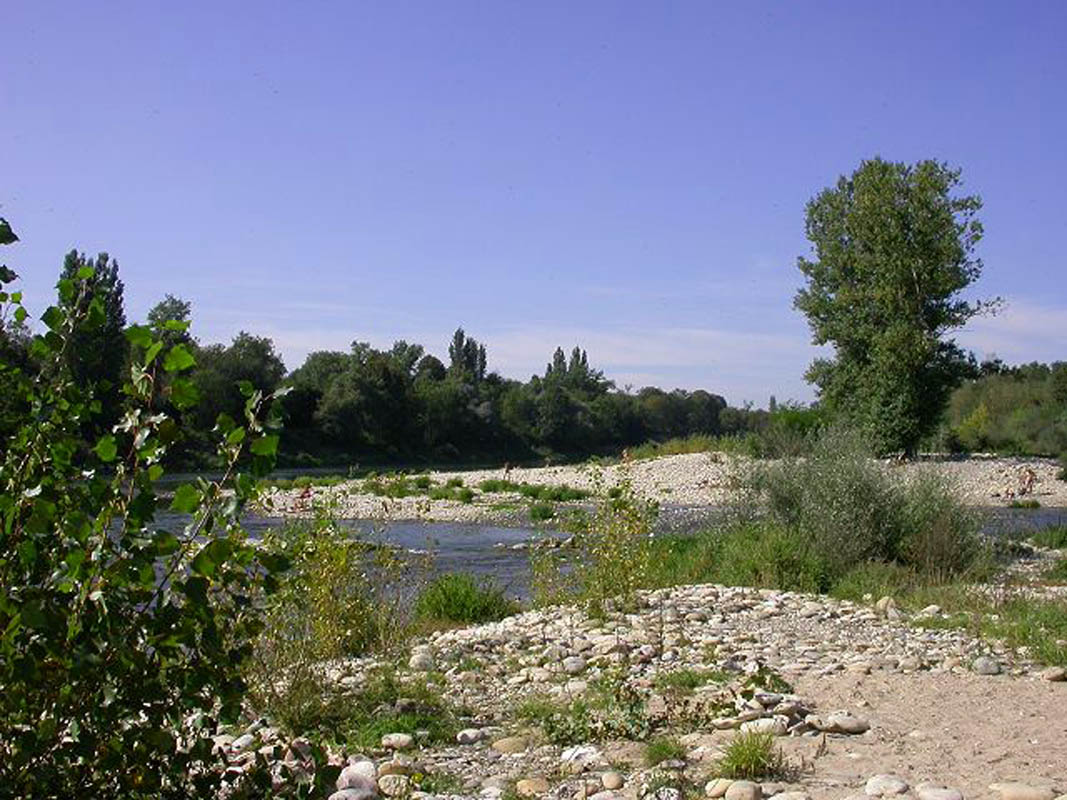 Isteiner Schwelle in Richtung Norden.